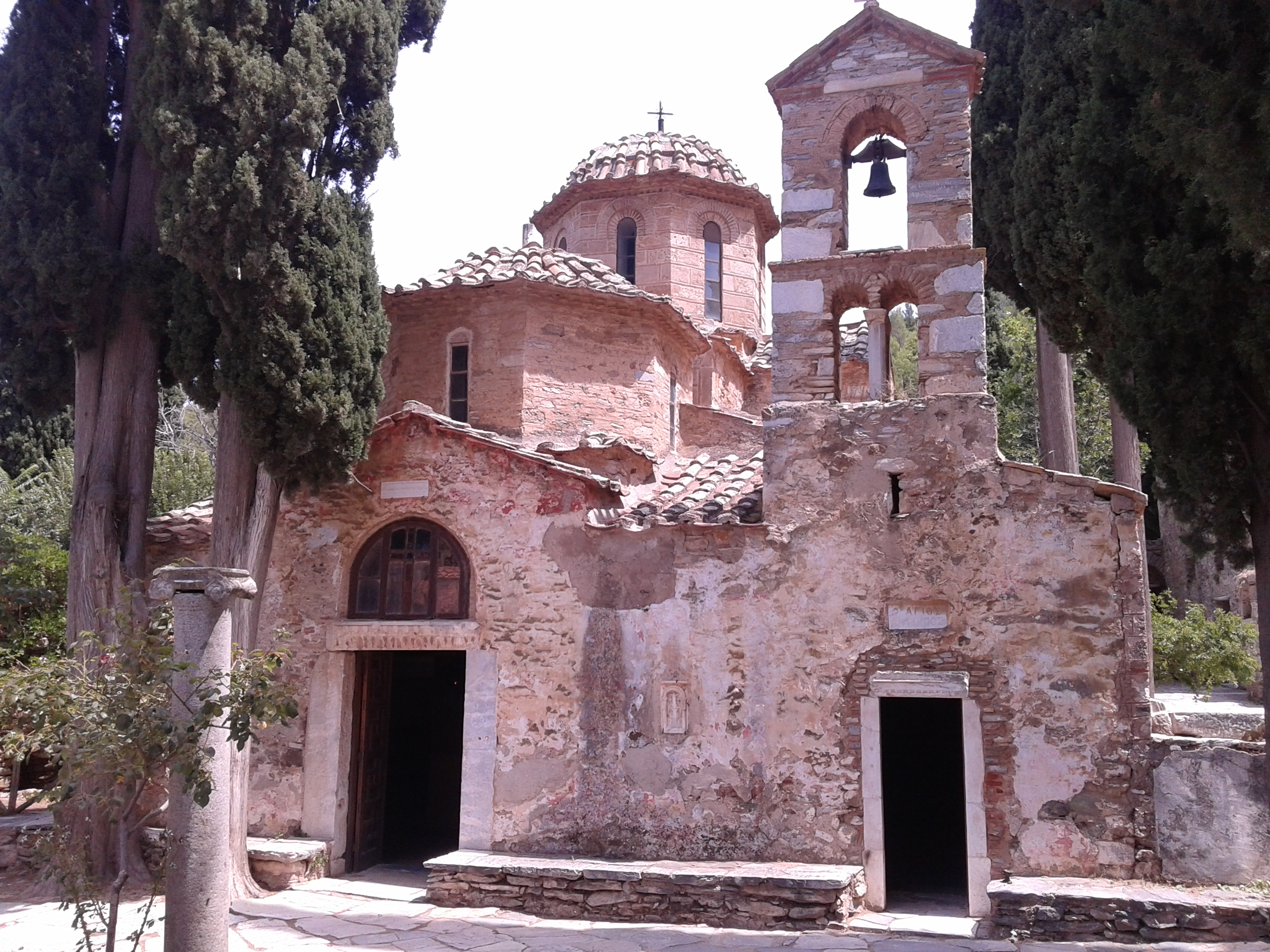 Μονή Καισαριανής. Εξωτερική άποψη του Καθολικού της Μονής.«Μονή Καισαριανής»